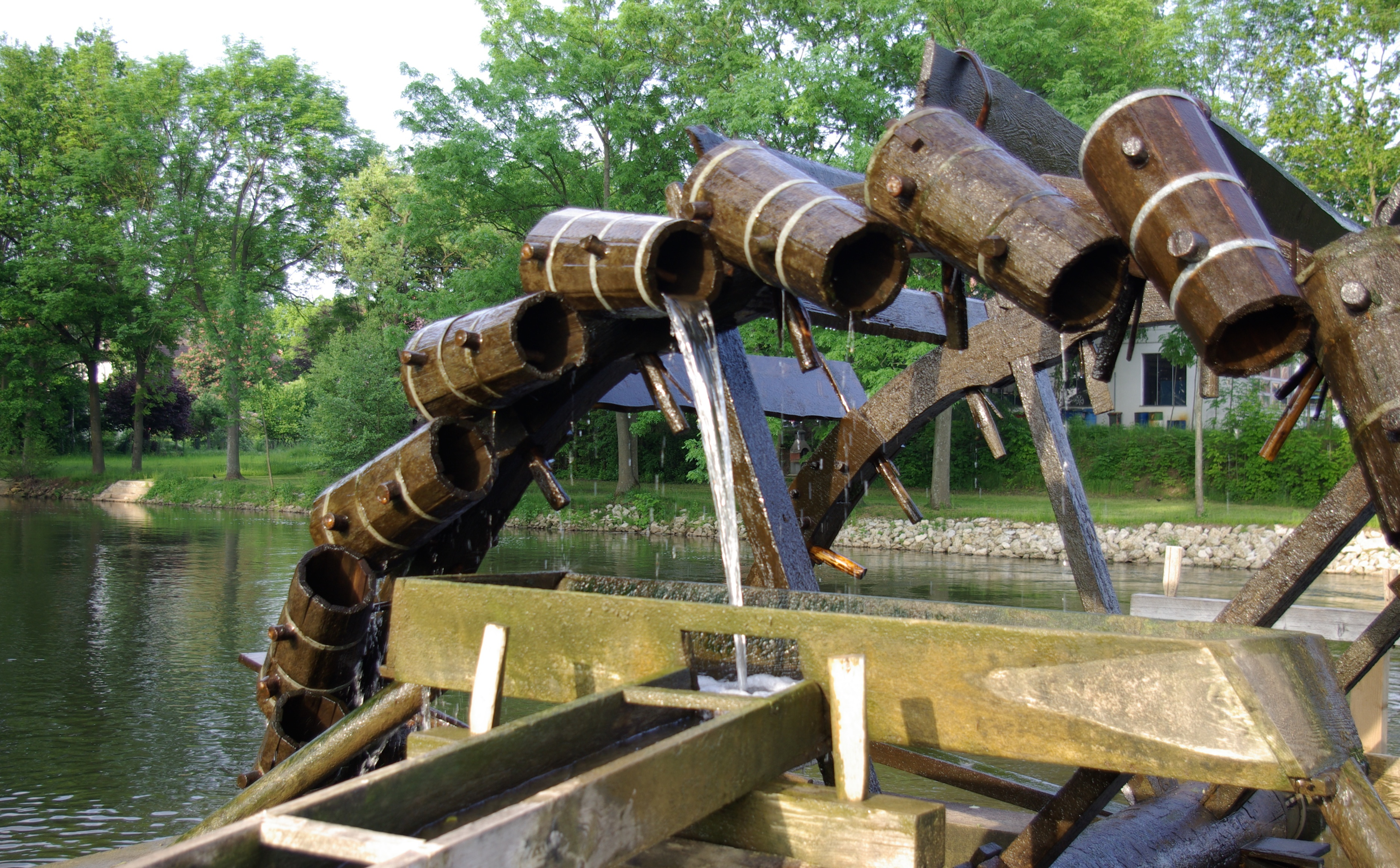 Wasserschöpfrad im Erlanger Stadtteil Bruck